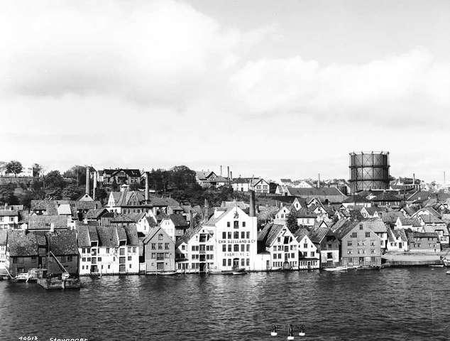 Hermetikkfabrikker i Stavanger, 1934